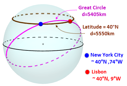 Голем круг 1